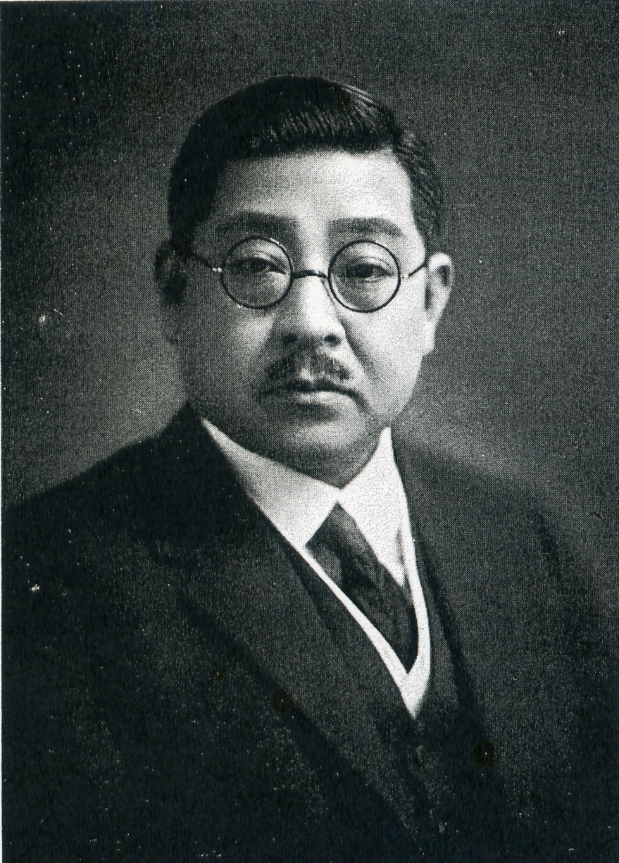 この写真は、高橋熊次郎（1880-1957）の写真です。